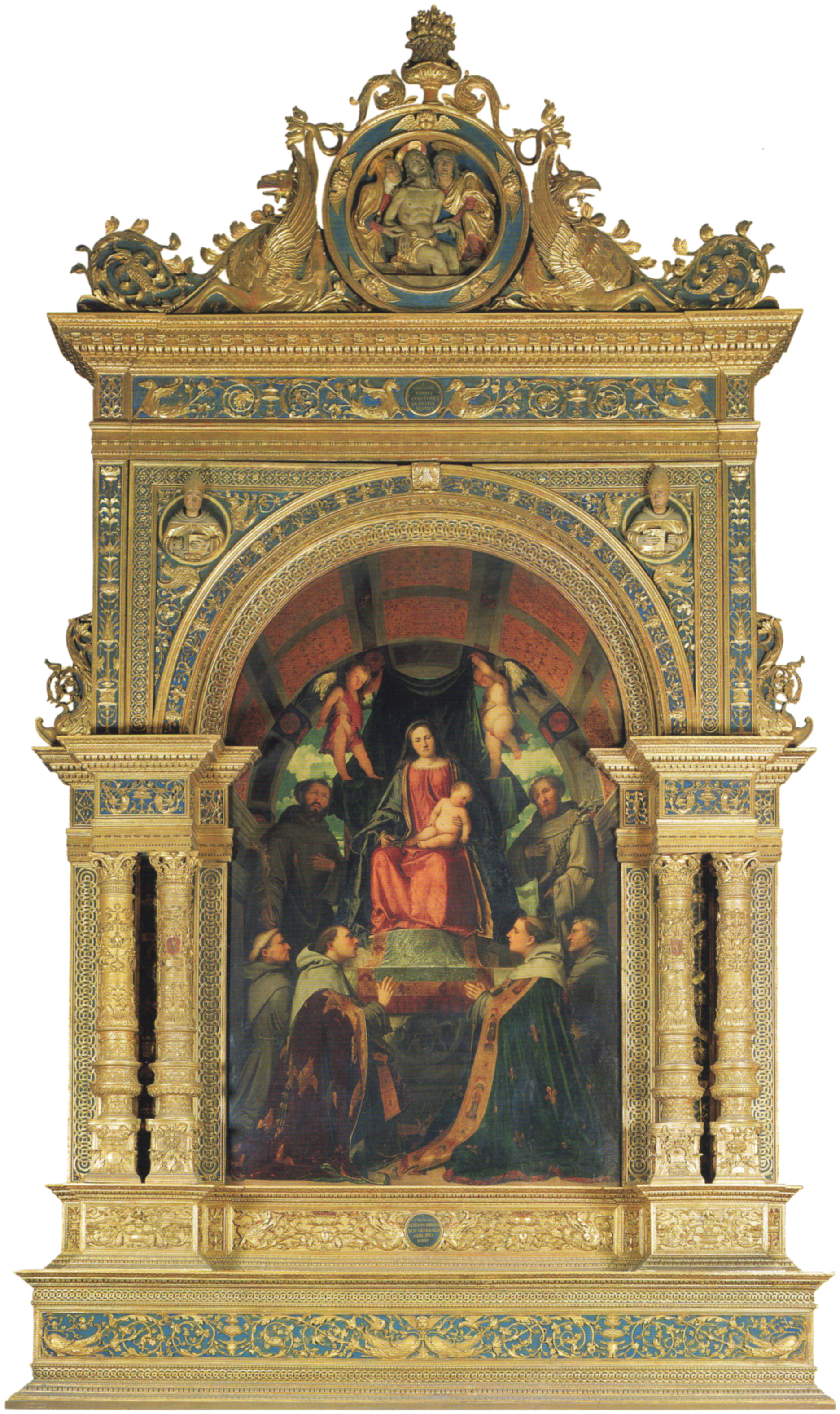 Pala di san francesco (Romanino) con ancona di Stefano Lamberti